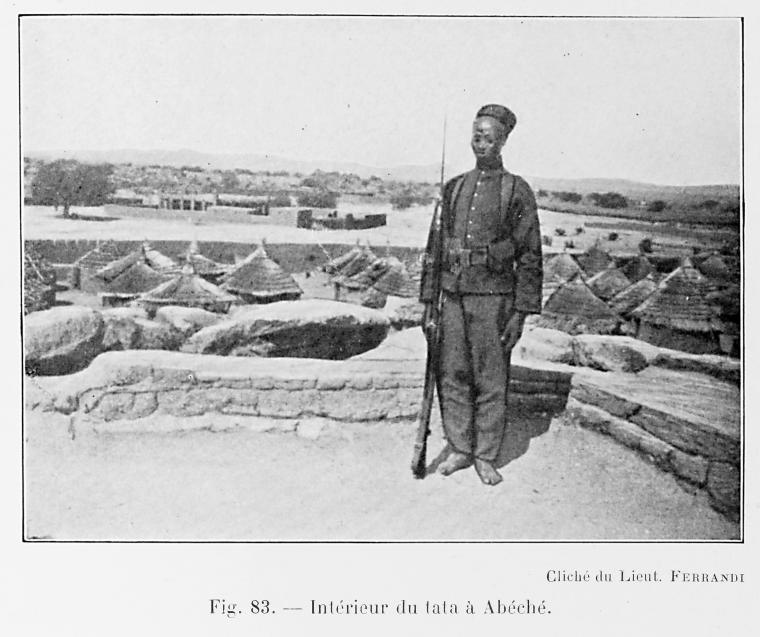 Intérieur du tata à Abéché. From L'Afrique Équatoriale Française: le pays, les habitants, la colonisation, les pouvoirs publics. Préf. de M. Merlin. Avec 186 reproductions photographiques, 33 diagrammes, profils, et 7 cartes dont 5 en couleurs, (published 1918).